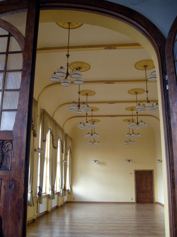 Dawna sala do zajęć plastycznych w IV LO w Bytomiu